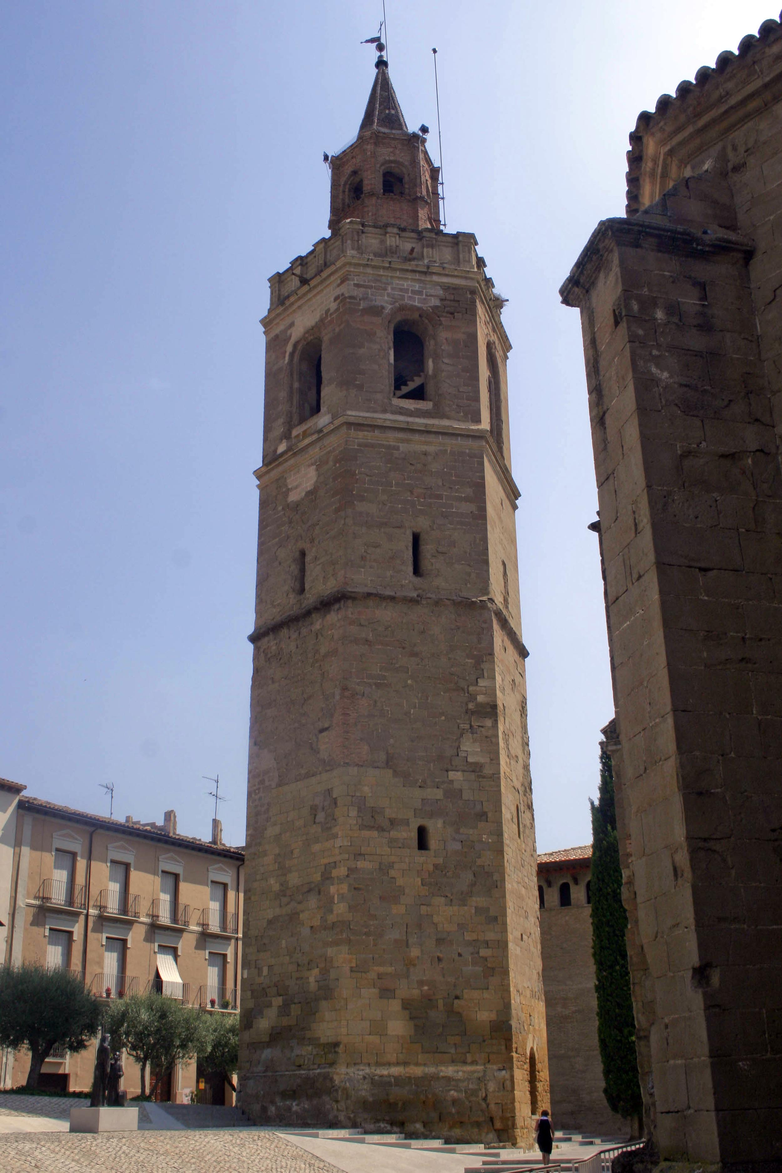 Clocher-tour de la cathédrale, Barbastro (Huesca, Aragon, Espagne)